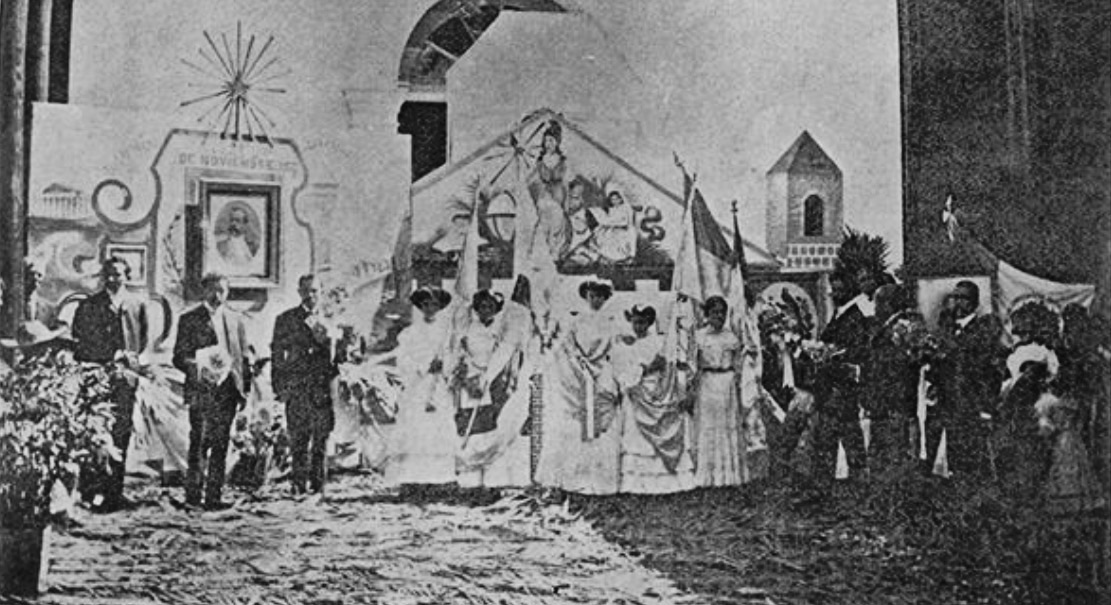 Celebración del cumpleaños del presidentr Manuel Estrada Cabrera en Quiché por el general Fidel Echeverría Flores en Quiché. 1907